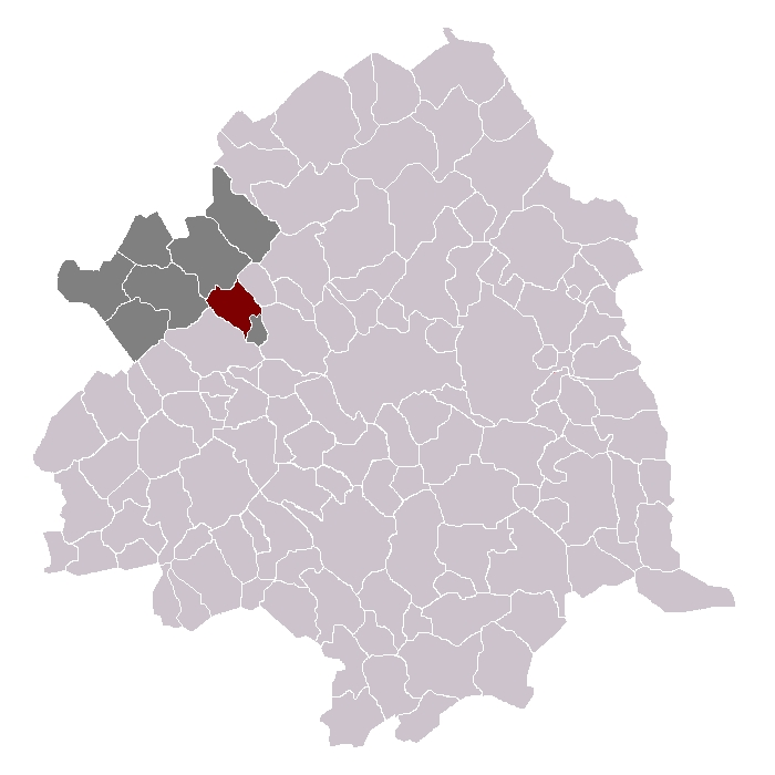 Presmesques dans son canton et son arrondissement